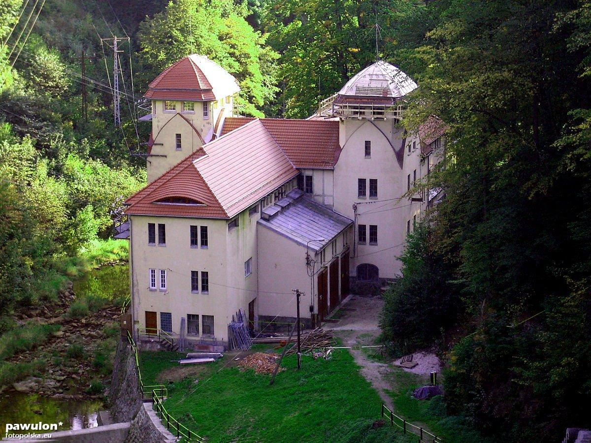 Elektrownia wodna Leśna, widok z zapory.